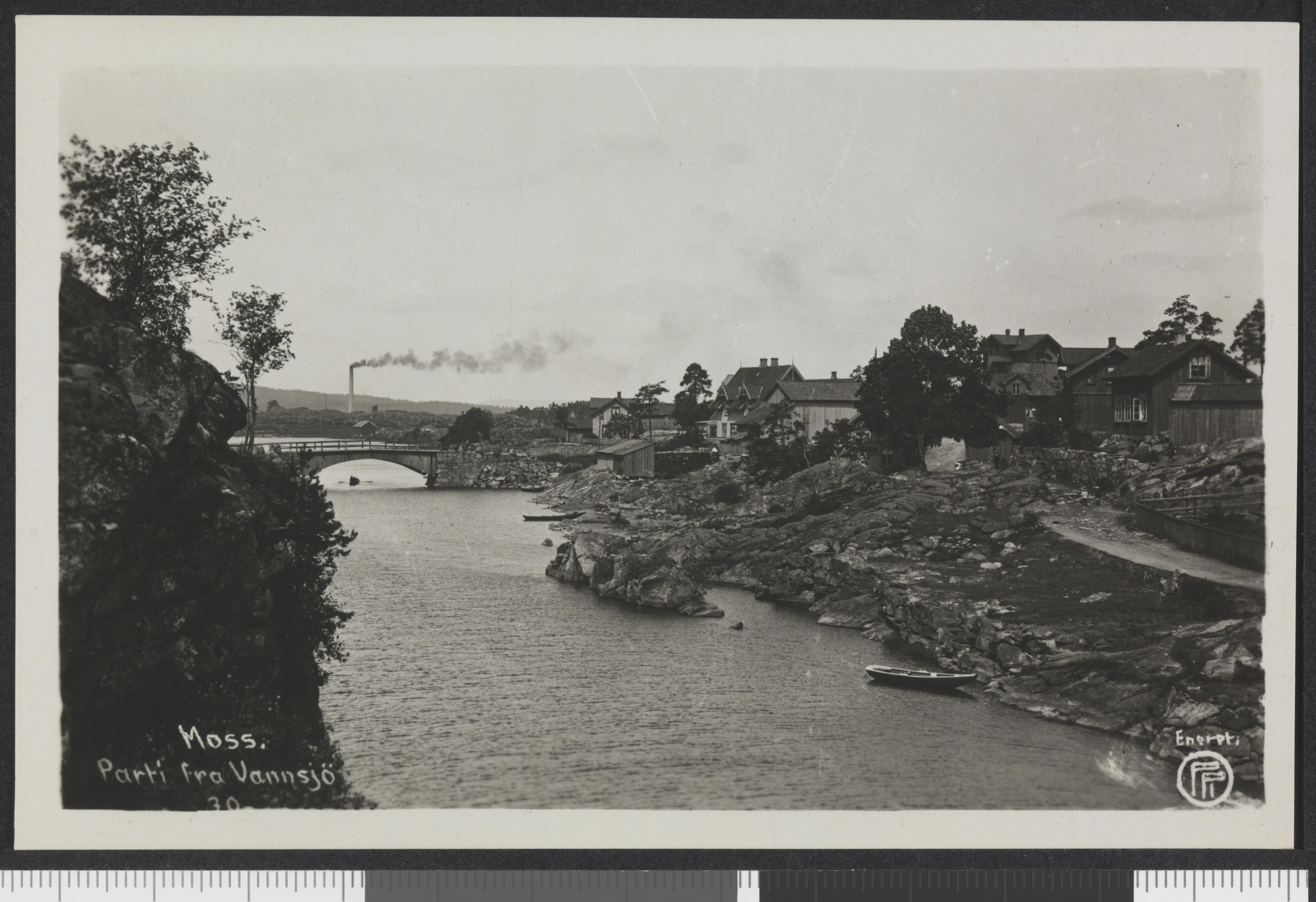 Bildet er hentet fra Nasjonalbibliotekets bildesamling Moss,Vannsjø, Moss, Østfold